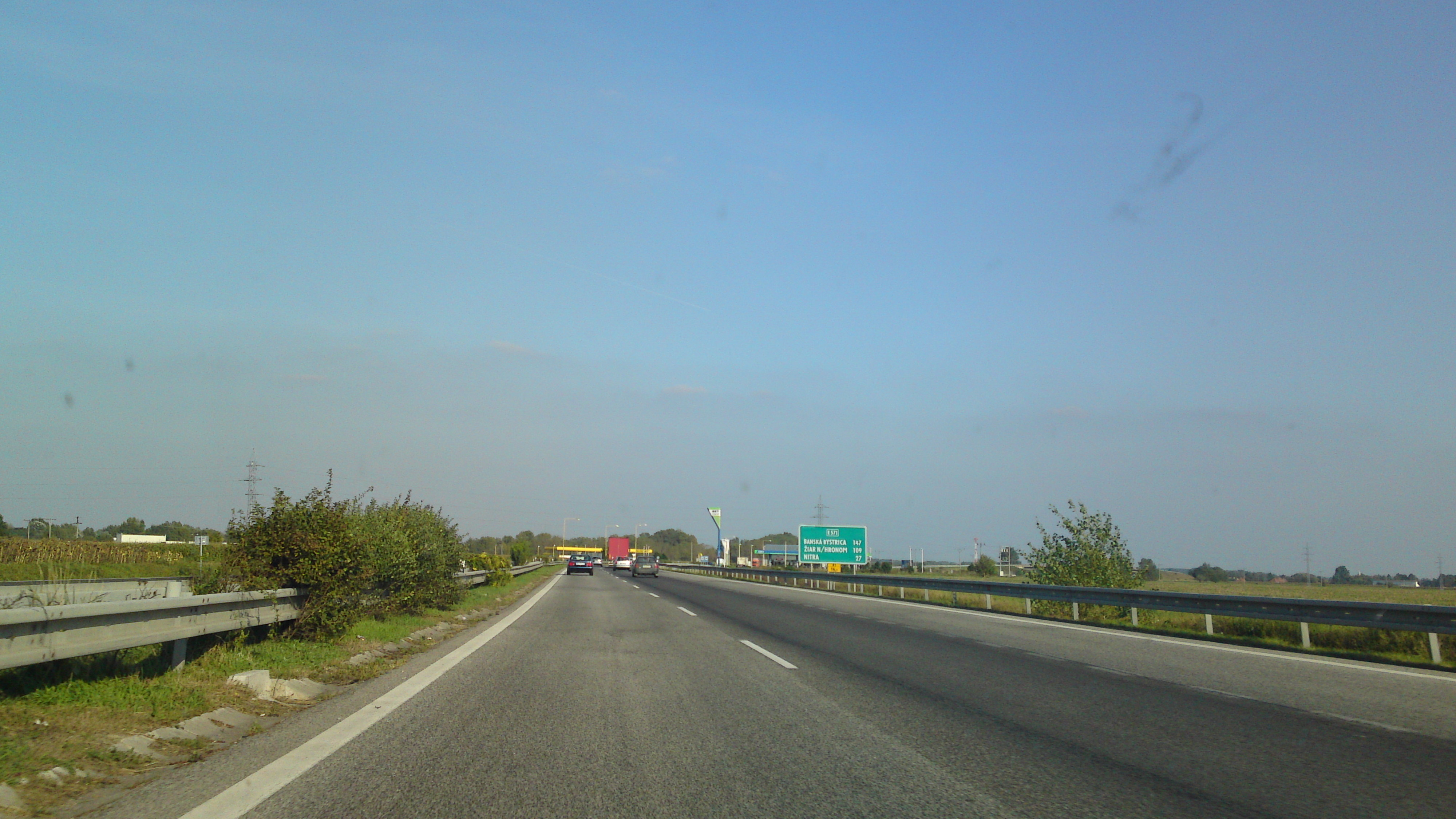 Die Schnellstraße R1 bei Dolná Streda, kurz vor Tankstelle Dolná Streda und Waagbrücke, Richtung Nitra. Aufnahme während der Fahrt.